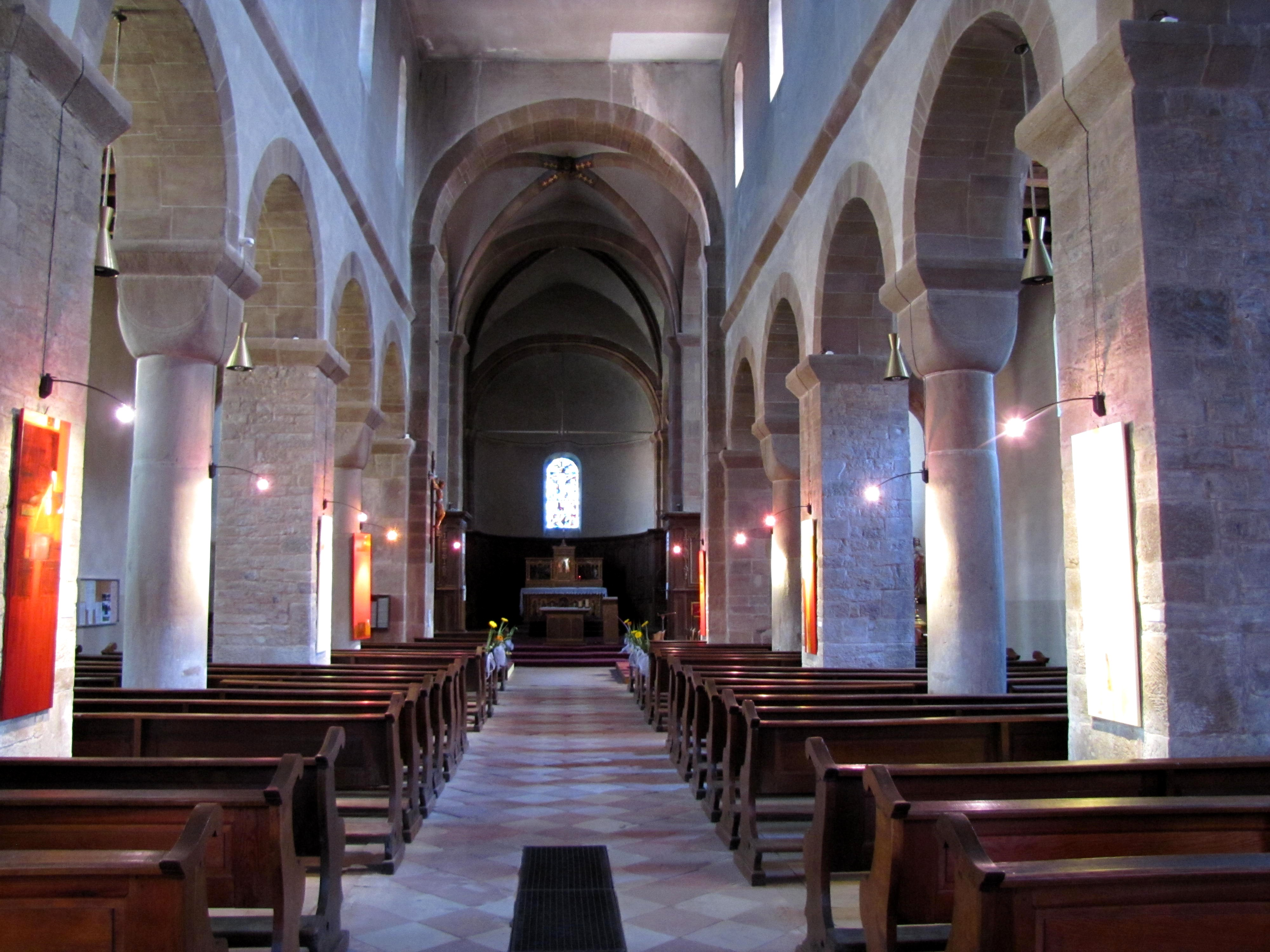 Alsace, Bas-Rhin, Surbourg, Abbatiale Saint-Jean-Baptiste (PA00085200, IA00119029): Vue intérieure de la nef vers le chœur.